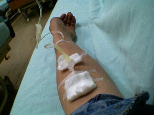 Intravenous